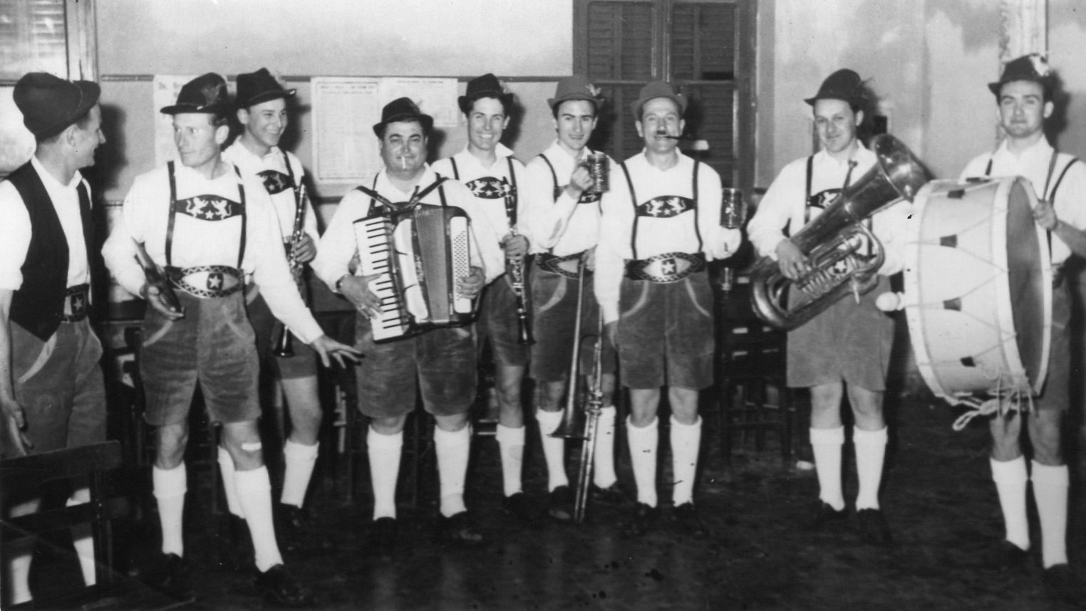 Esta es la primer formación de Zillertal, ya desde entonces caracterizada con vestimenta centroeuropea y los clásicos instrumentos de viento y percusión.